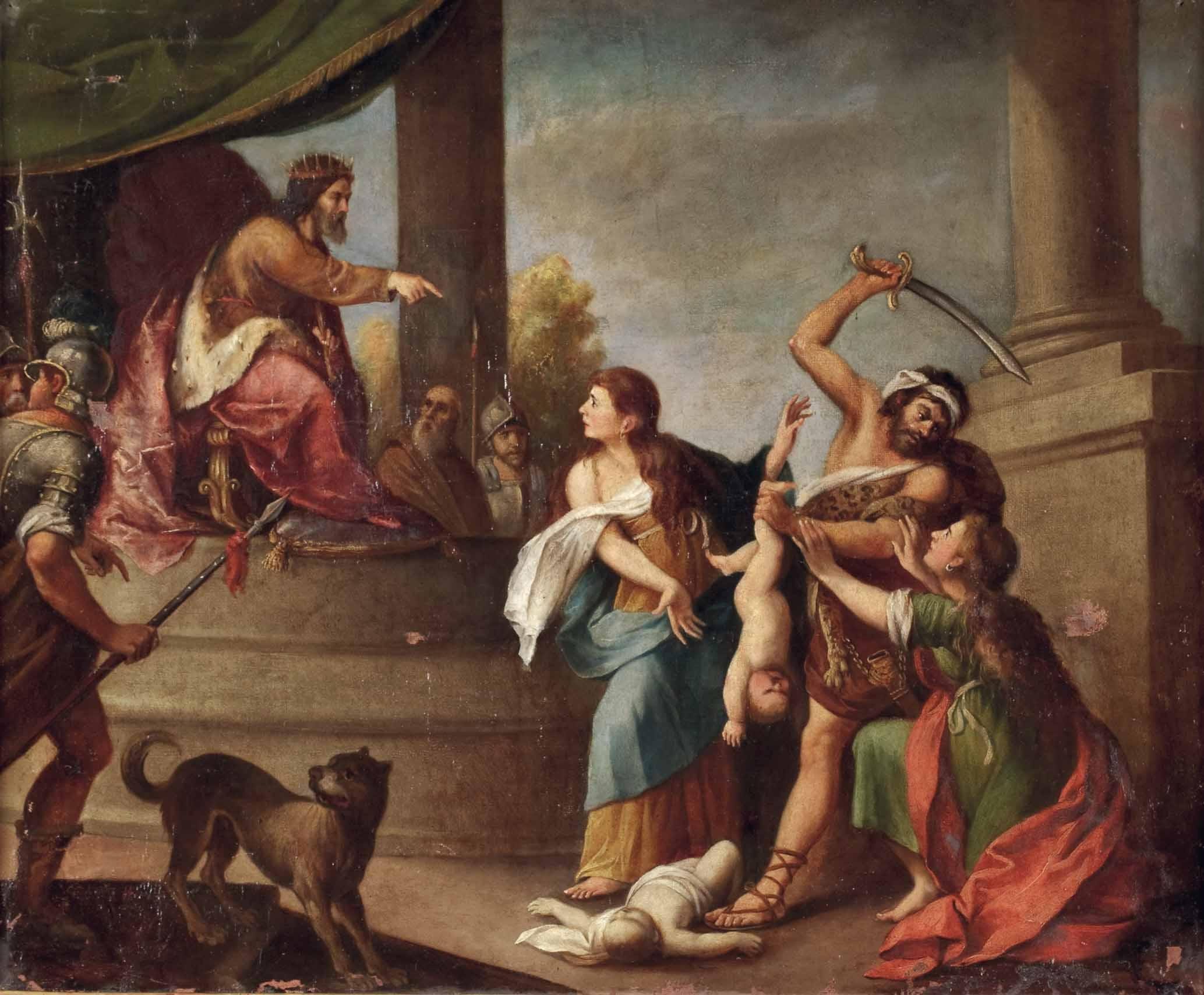 Das salomonische Urteil. Italienische Schule, 18. Jh. Öl auf Leinwand, 72 x 87 cm